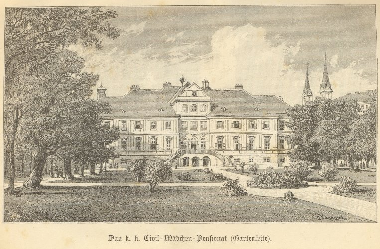 Das k.k. Civil-Mädchen-Pensionat in Wien VIII, Josefstädterstraße 39 (Palais Strozzi)(Gartenseite)